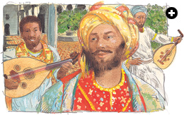 کوردی: وێنەی خەیاڵی زەریاب